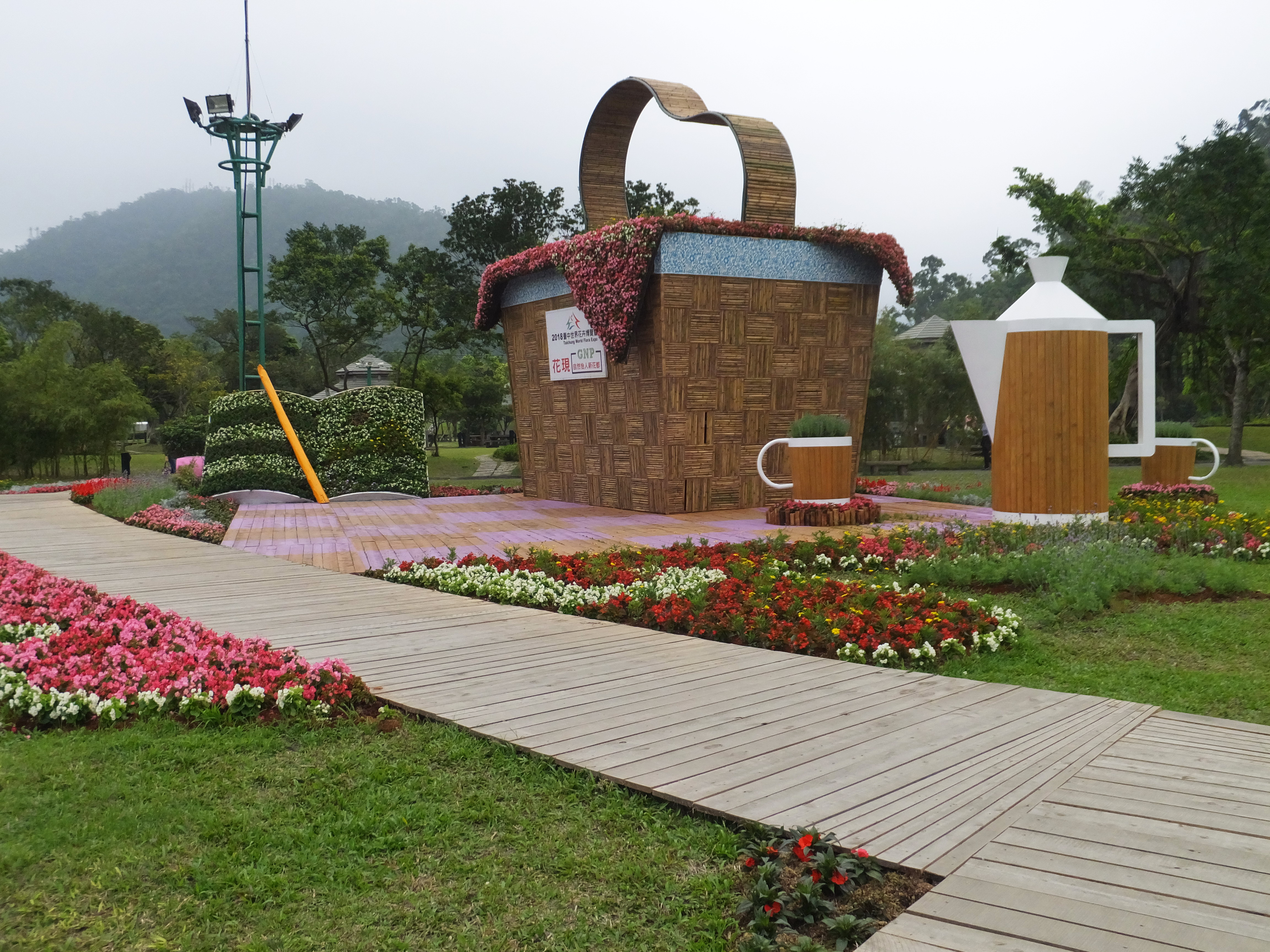 Yilan Green Expo 2016 宜蘭綠色博覽會